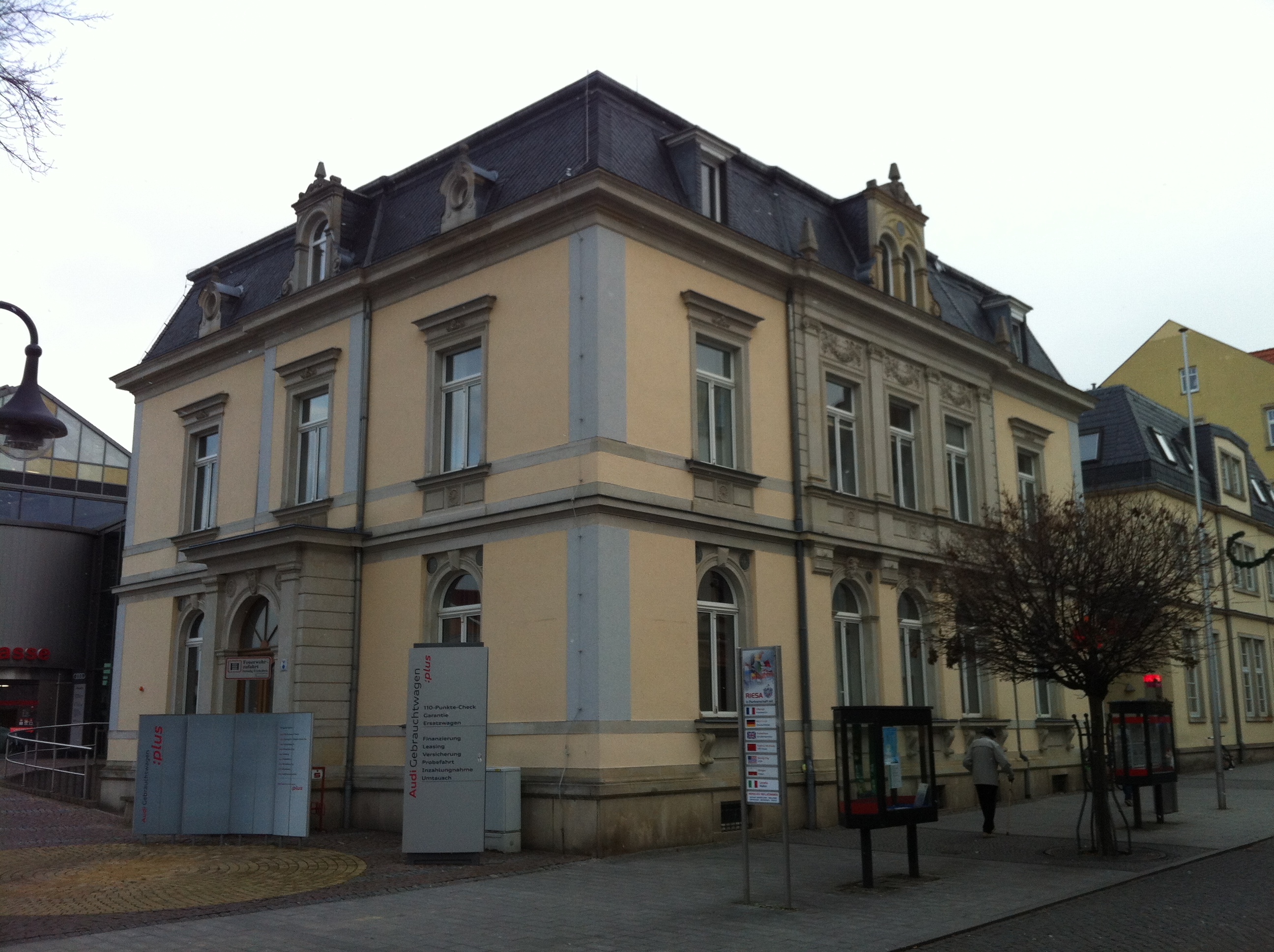 Kreissparkasse Riesa-Großenhain in Riesa; denkmalgeschütztes Gebäude in der Hauptstraße 70